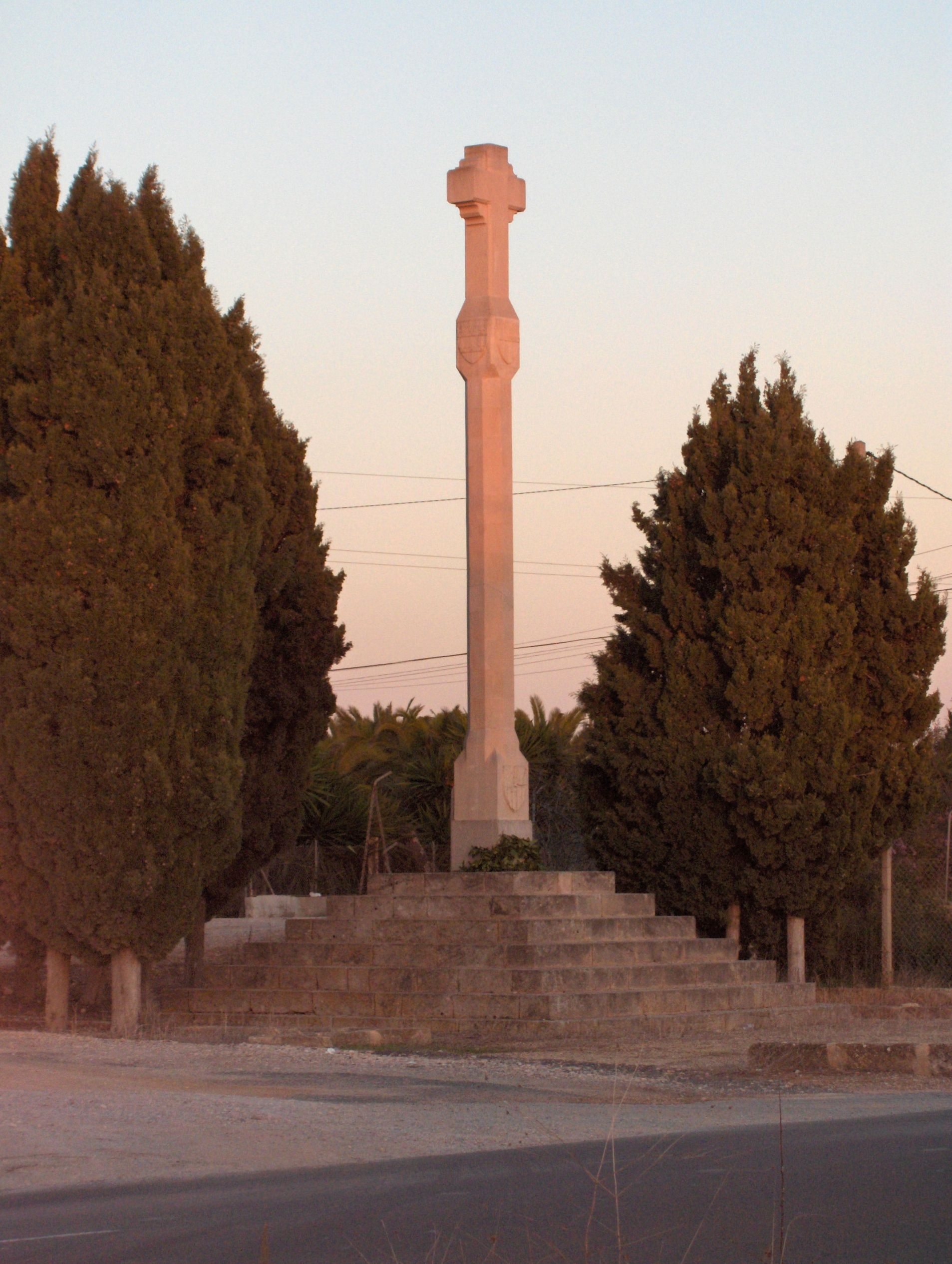 Monument al rei Jaume III de Mallorca al lloc on morí a la batalla de Llucmajor.